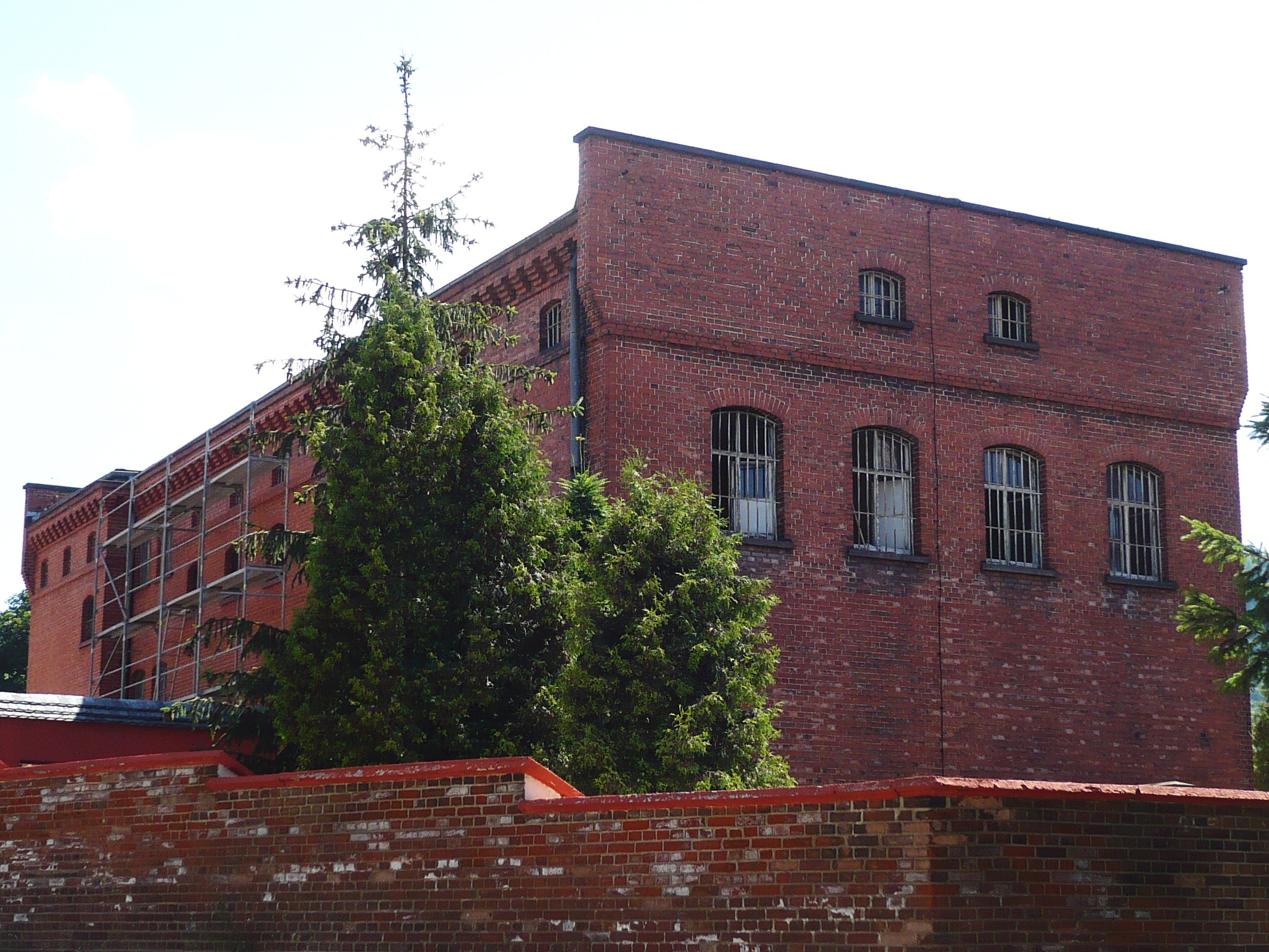 Nowa Ruda, ul. Bohaterów Getta 29 - pierwotnie sąd, obecnie komisariat policji, 1887-1889